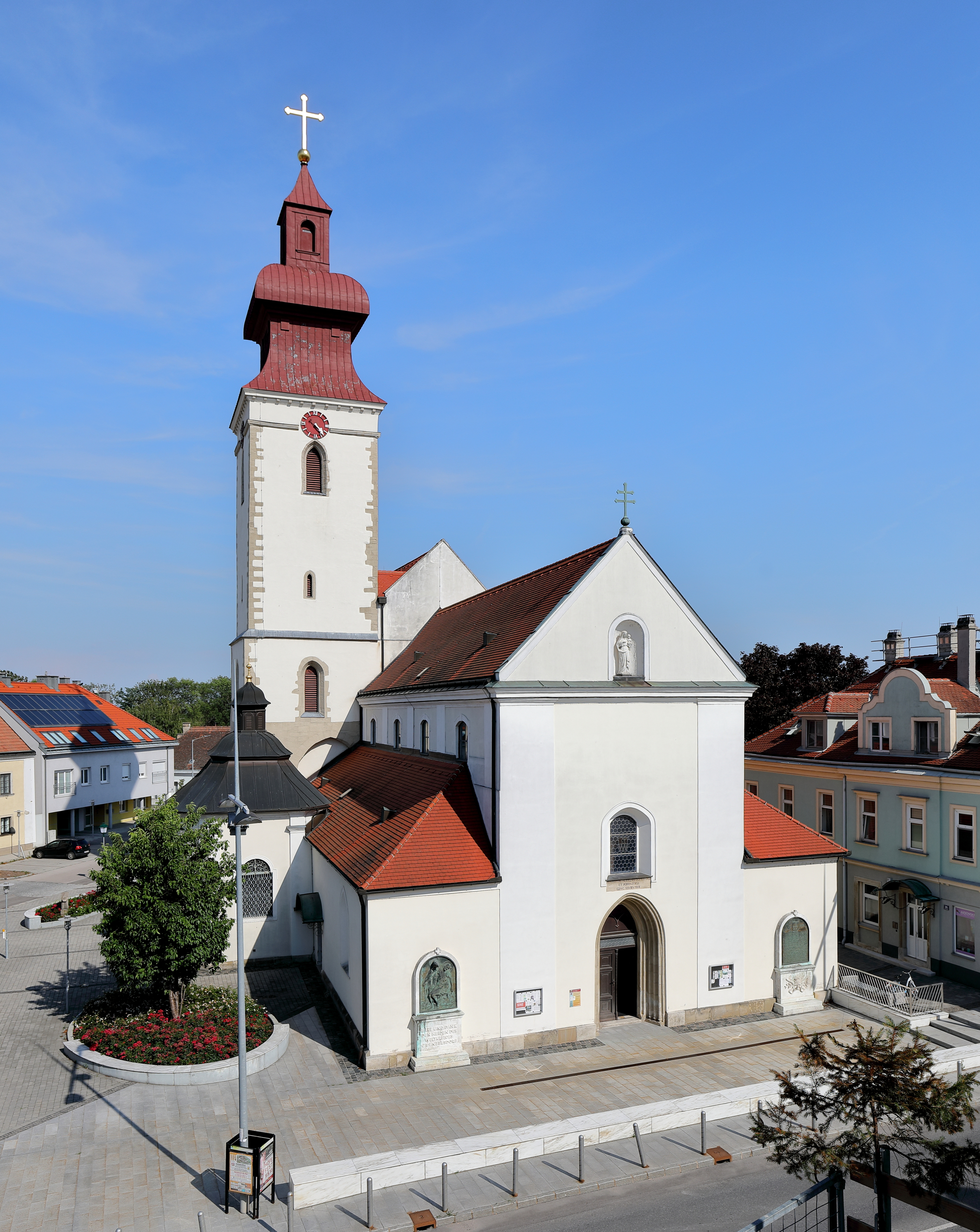 Nordwestansicht der röm.-kath. Pfarrkirche Maria Schutz in der niederösterreichischen Stadtgemeinde Groß-Enzersdorf. Eine ehemalige Wehrkirche mit wuchtigem Nordturm, die in der 2. Hälfte des 17. Jahrhunderts brockisiert wurde. Das Langhaus wurde Ende des 13. Jahrhunderts errichtet und der erhöhte Chor Ende des 14. Jahrhunderts. Die Sakristei und der Kapellenanbau wurden in der Barockzeit errichtet.